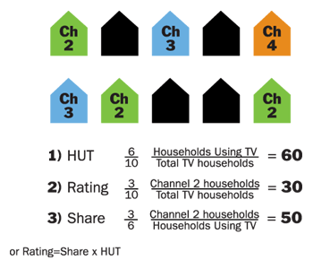 Nielsen Netratings